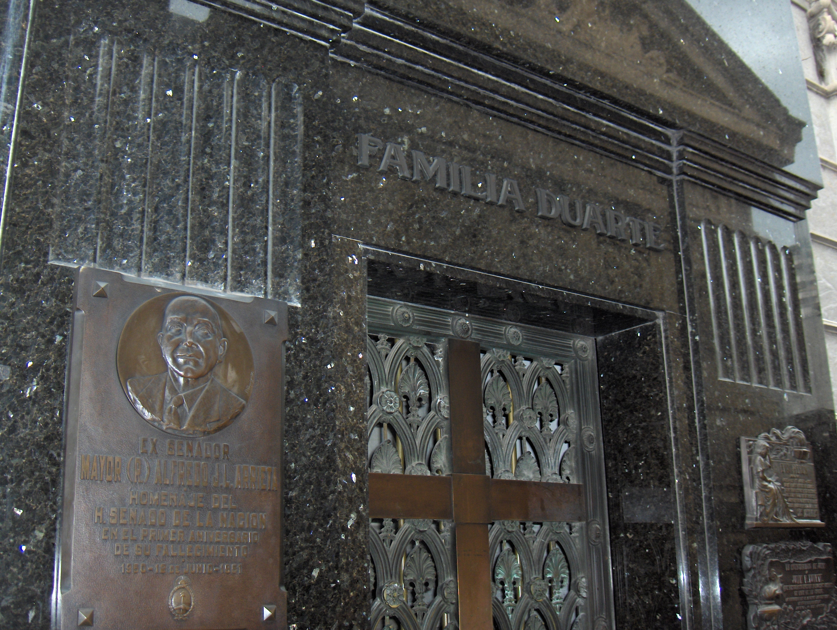 Mausoleo donde descansan los restos de Eva Duarte de Perón